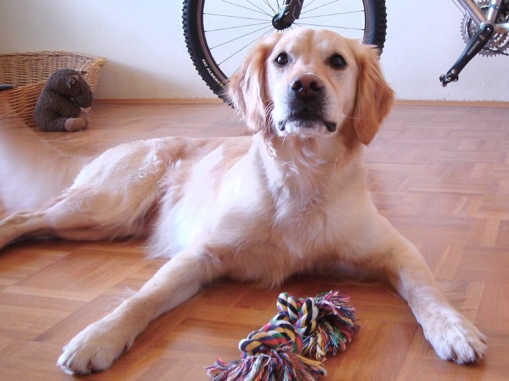 Golden Retriever mit freundlichem Ausdruck